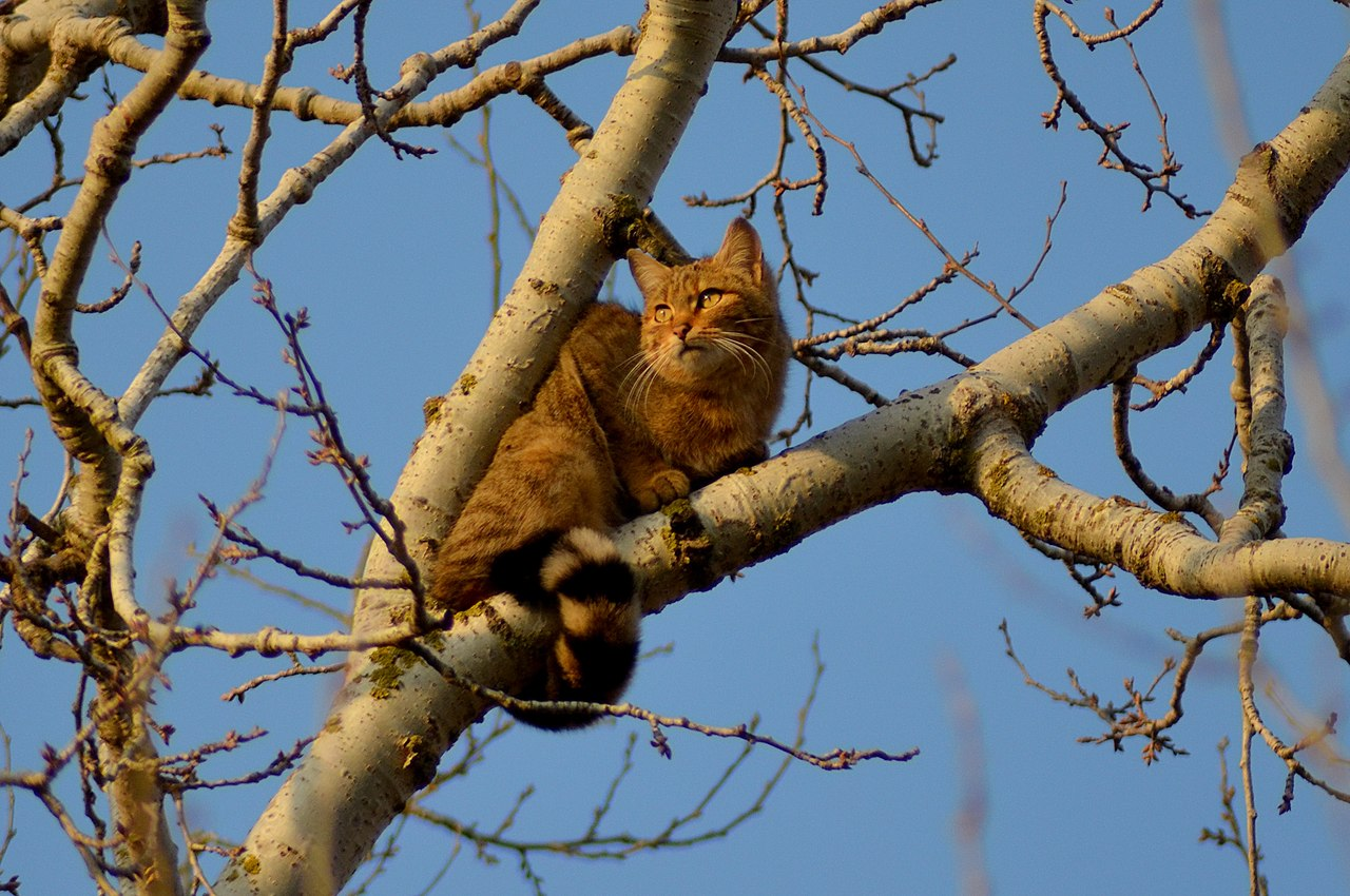 Кіт лісовий (Felis silvestris). Околиці м. Вилкове. Заплавний ліс.